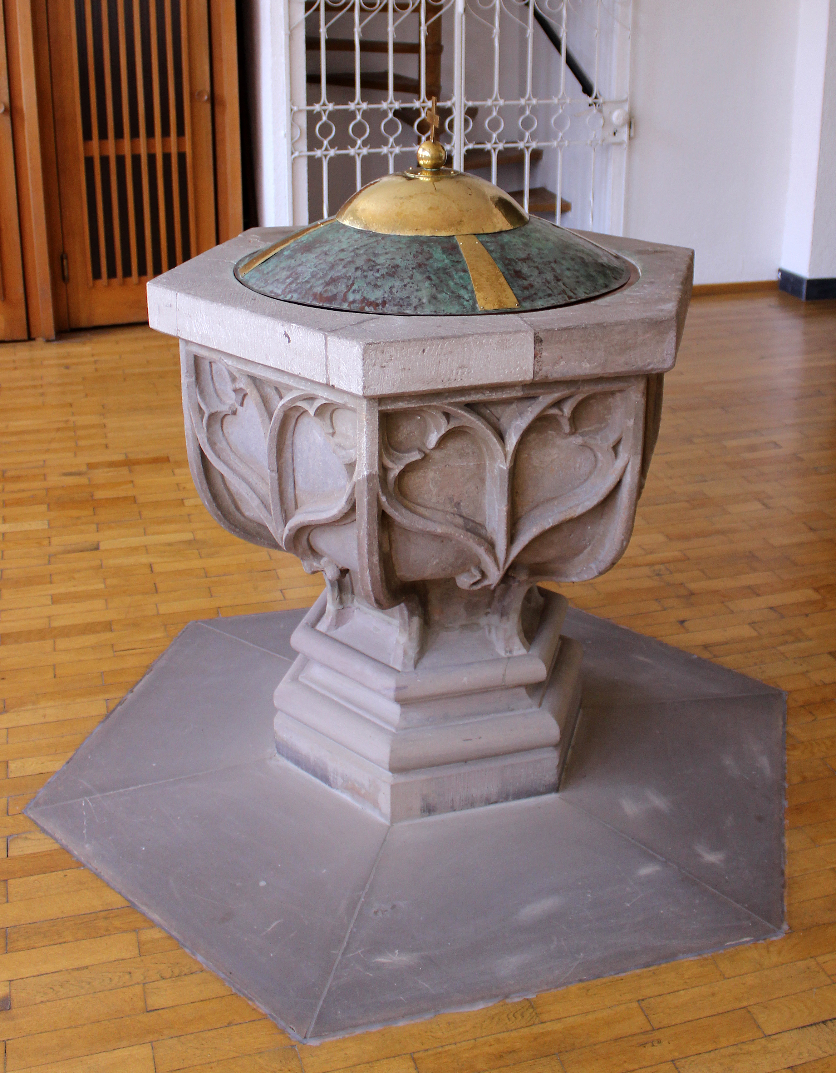 Taufstein (15. Jh.) der katholischen Pfarrkirche St. Katharina, Oberkirchen, Gemeinde Freisen, Landkreis St. Wendel, Saarland